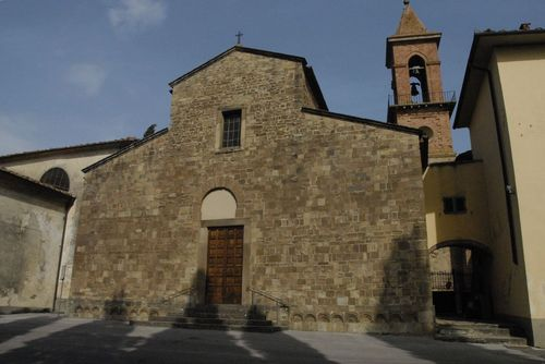 facciata della pieve di santa maria assunta a fabbrica (peccioli)